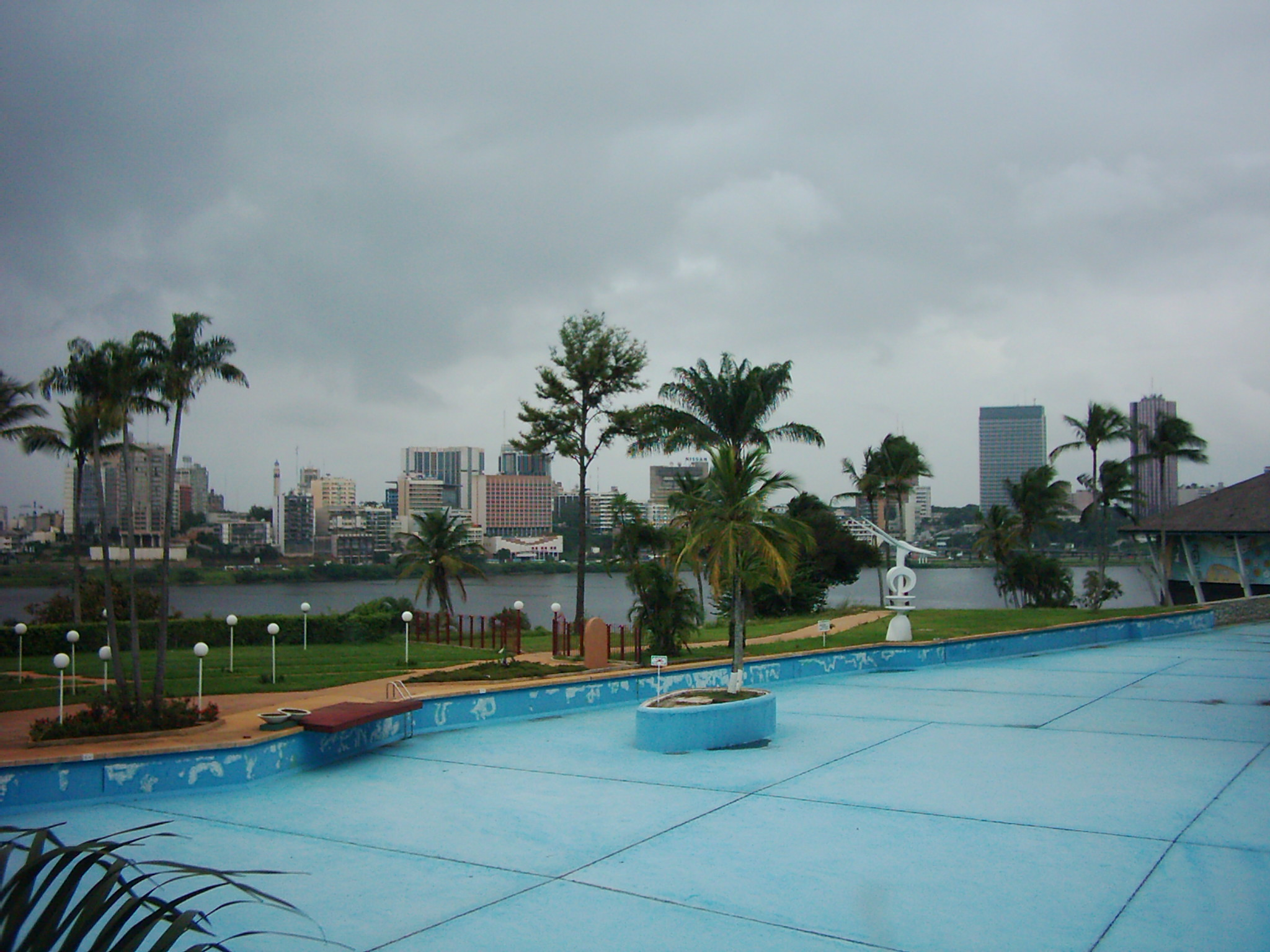 Vue de la piscine (vide) de l'hôtel Ivoire et du quartier du Plateau.